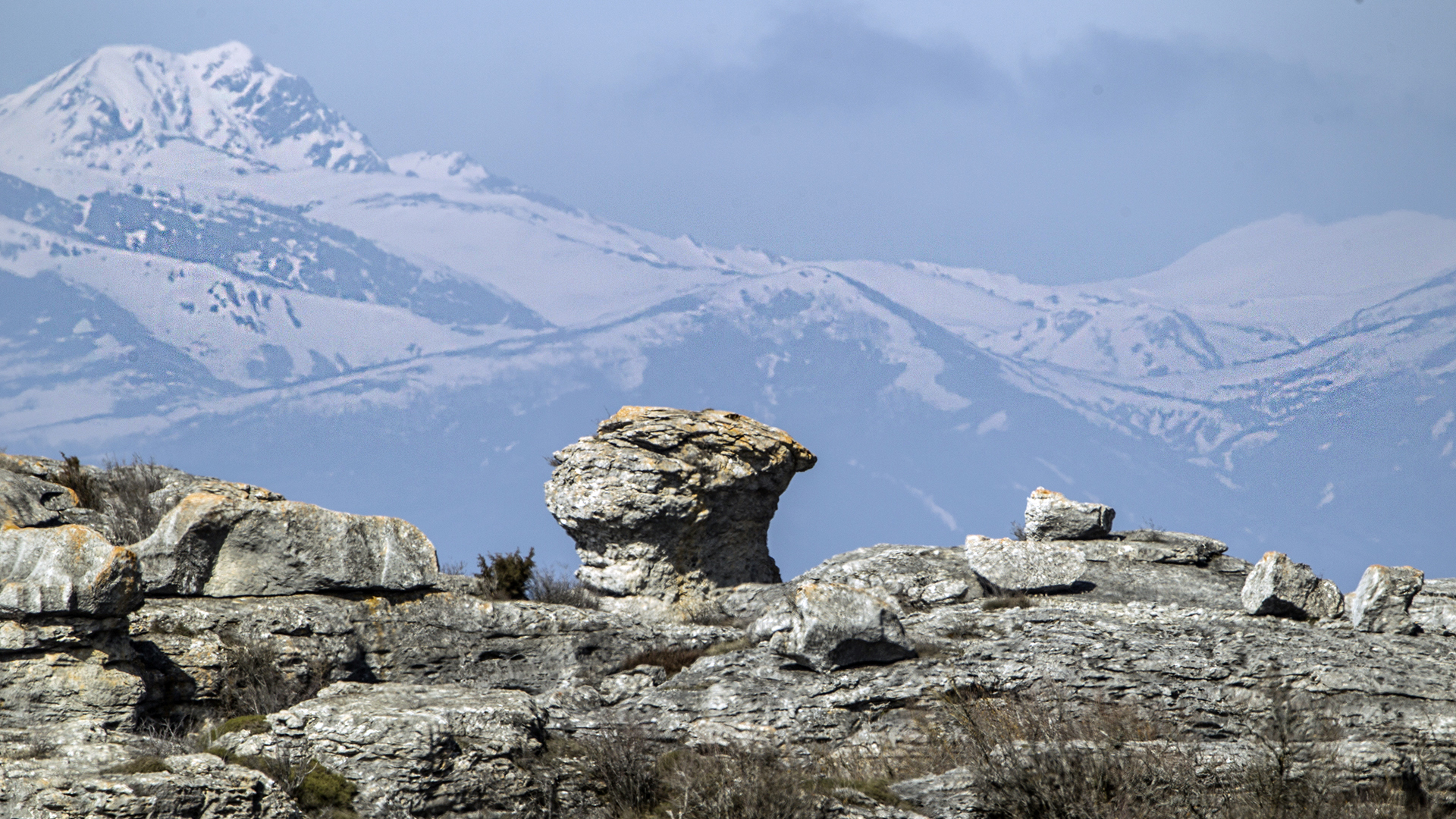 Figuras caprichosas en el paraje de la montaña palentina llamado Las Tuerces.